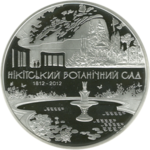 200 років Нікітському ботанічному саду срібна монета реверс